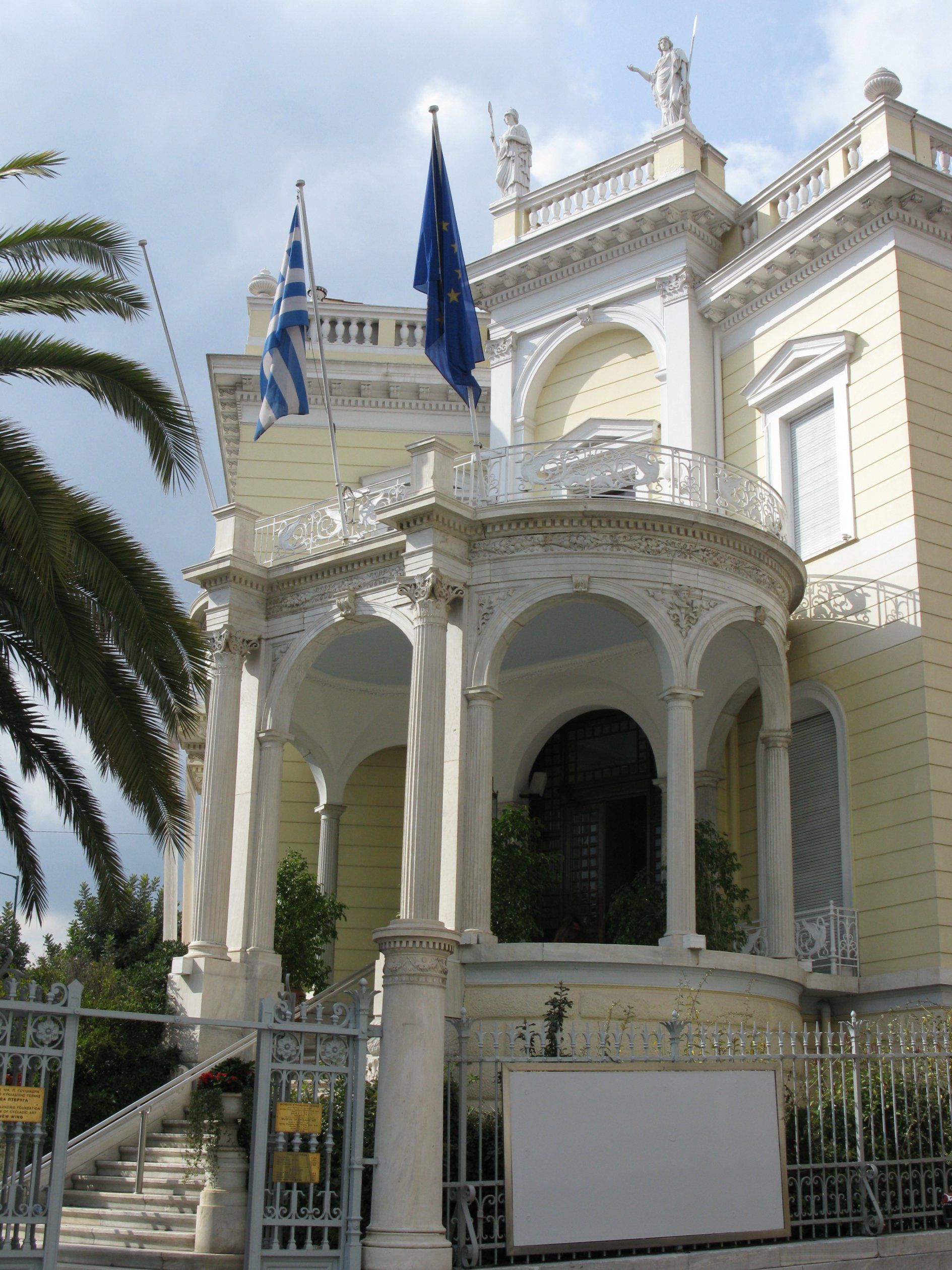 Μουσείο Κυκλαδικής Τέχνης (Νέα Πτέρυγα)